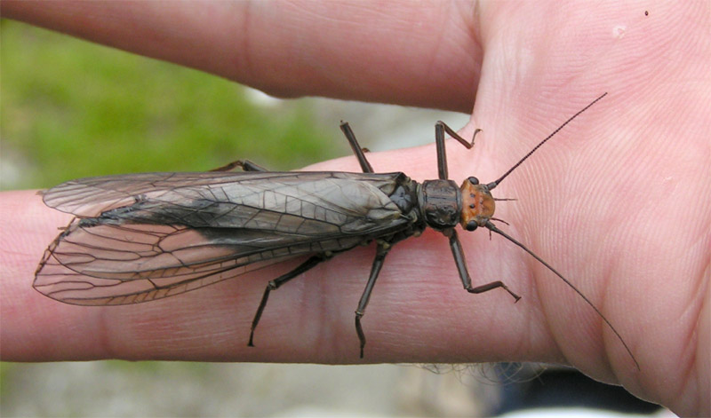 Steinfliege (Plecoptera), genaue Art unbekannt, fotografiert in der Wildschönau/Österreich